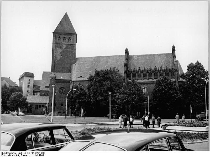 Berlin, Märkisches Museum Zentralbild Mittelstädt 11-7-69-Berlin: Blick auf das Märkische Museum am Köllnischen Park.